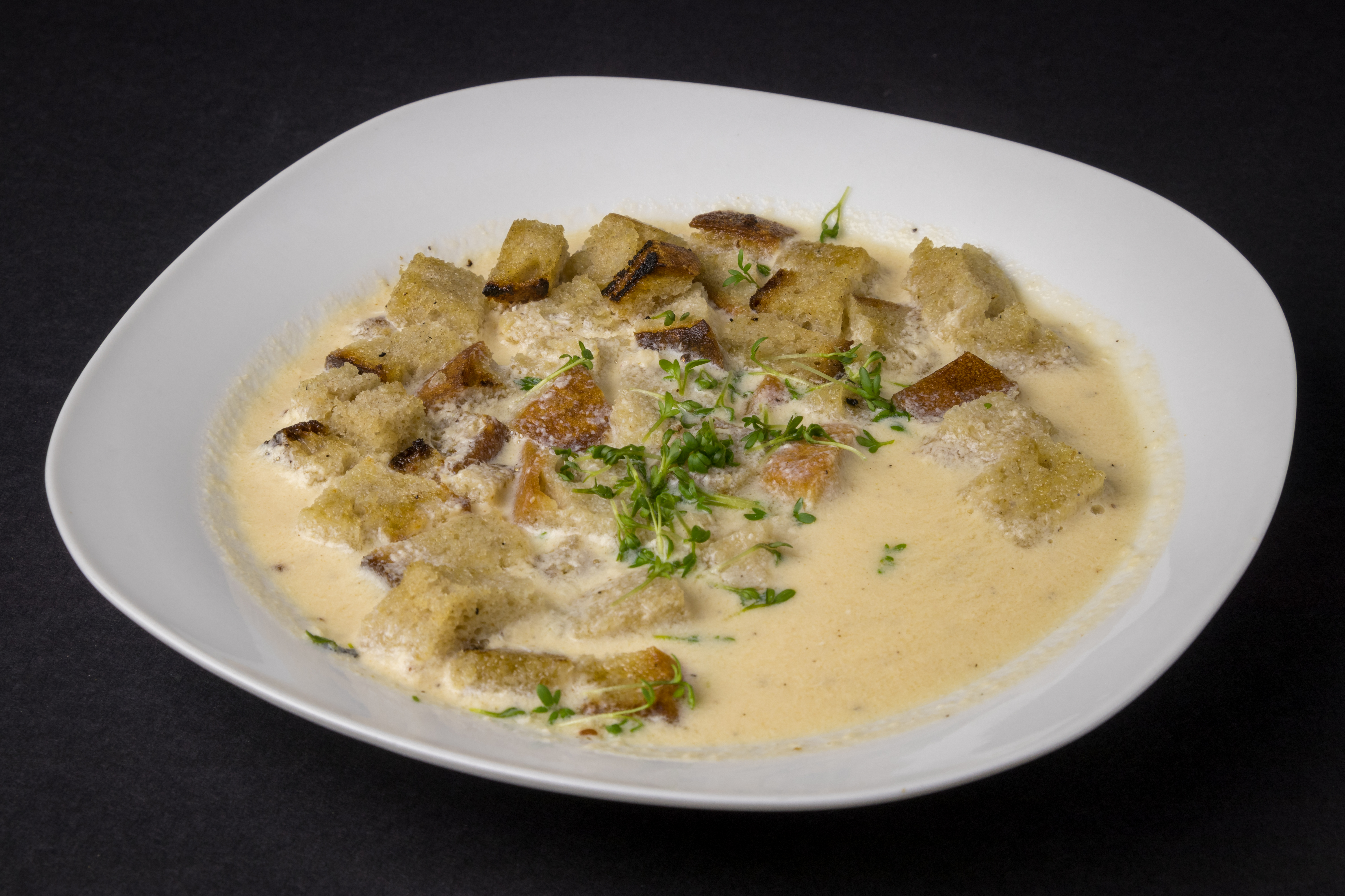 Biersuppe auf Basis von Kölsch auf gerösteten Brotstückchen